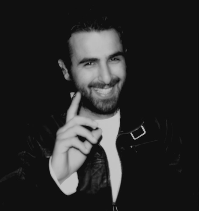 Efe Caircioglu